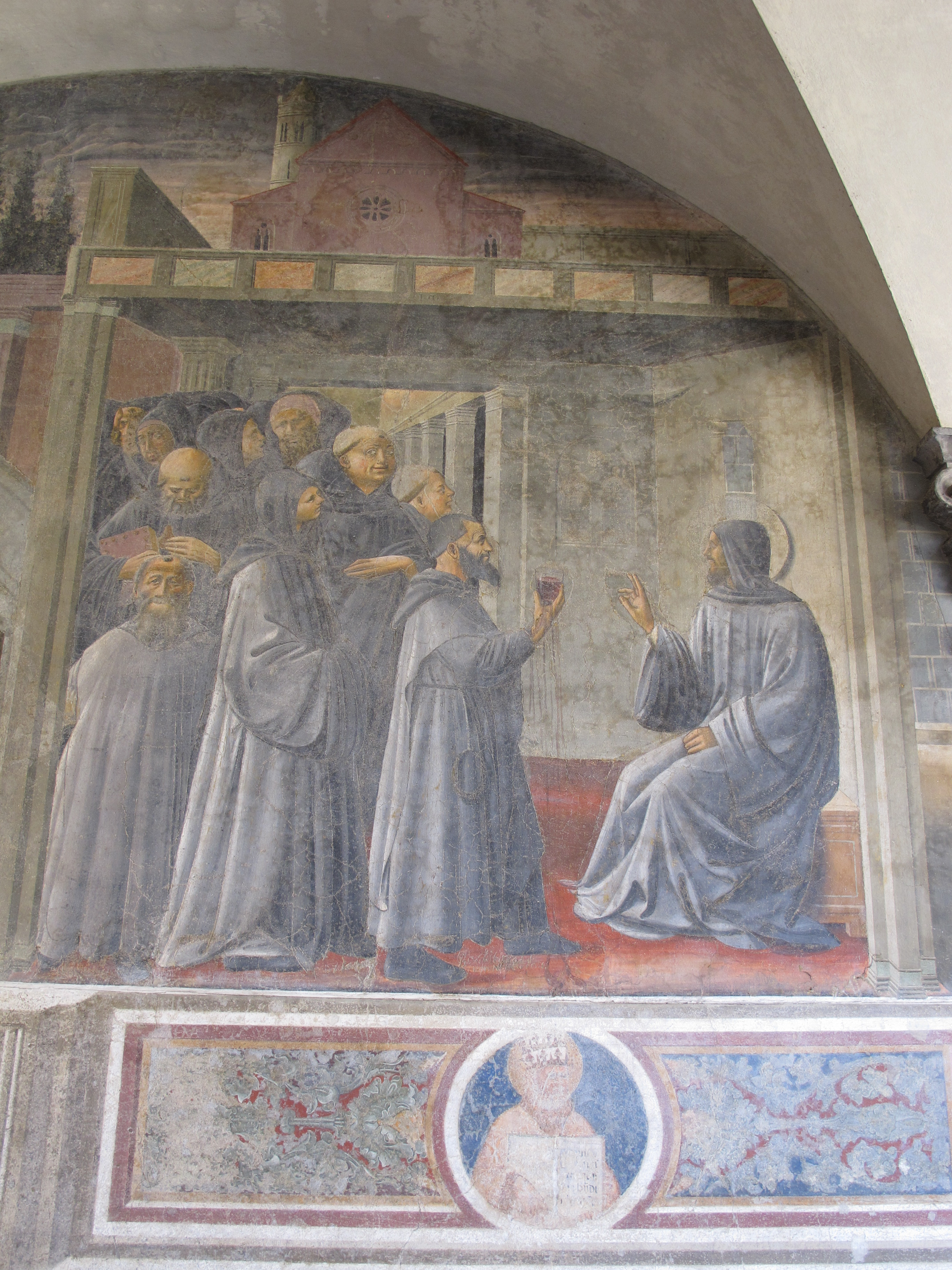 firenze 2011